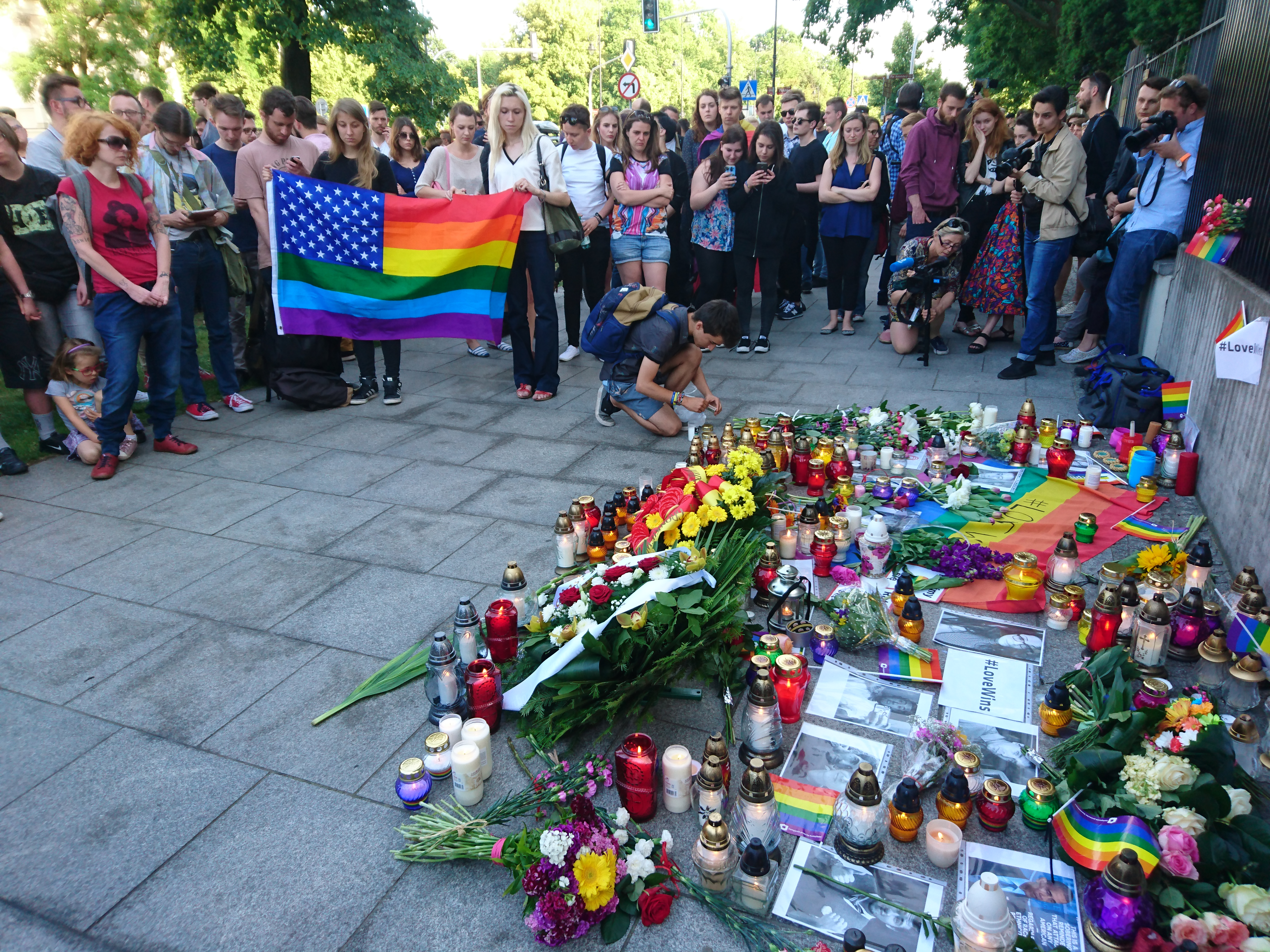 Solidarnie z ofiarami nienawiści. Manifestacja pod ambasadą Stanów Zjednoczonych w Warszawie po zamachu na klub gejowski w Orlando